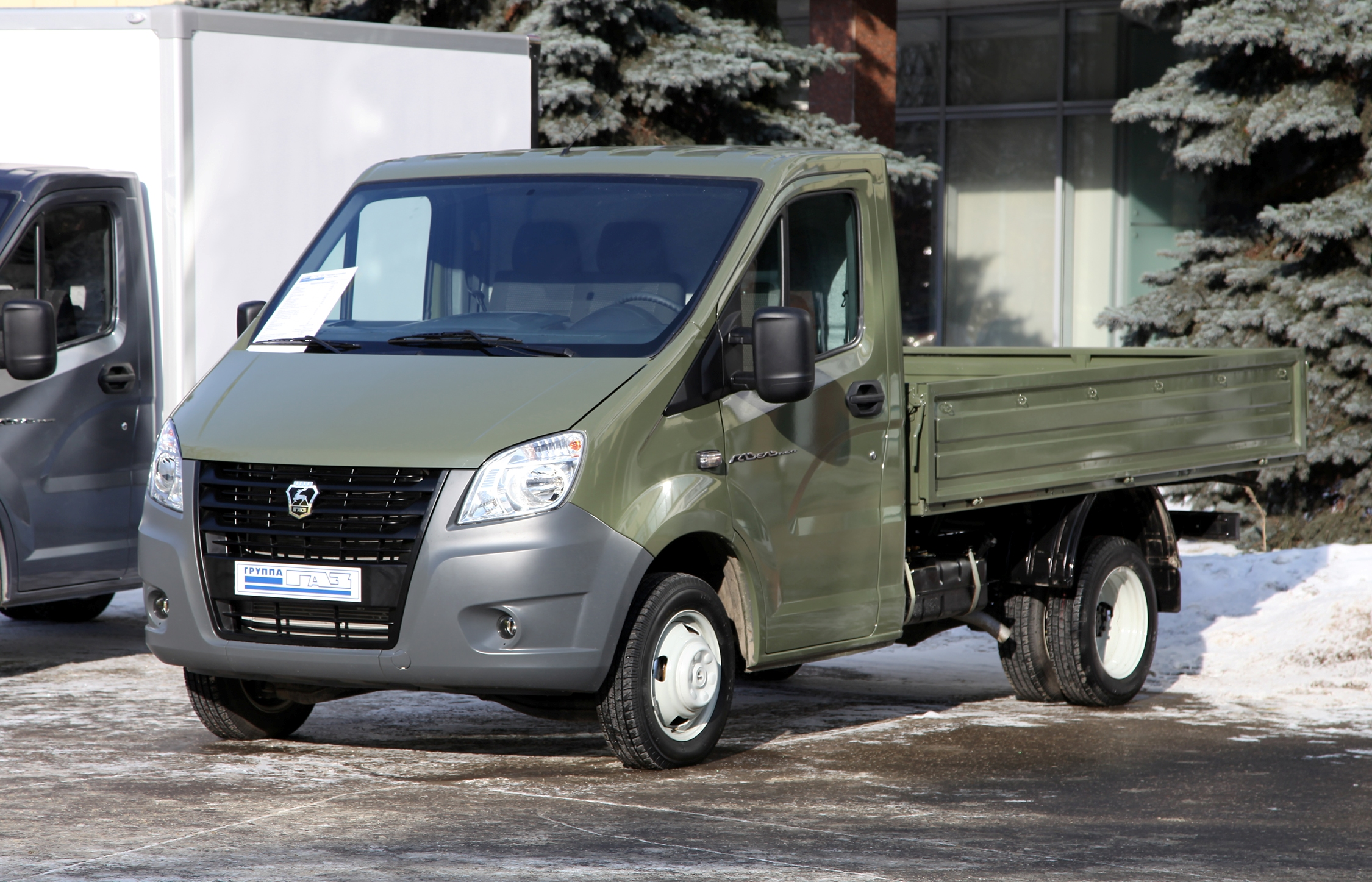 Бортовой автомобиль ГАЗ-А21R32 ГАЗель NEXT (GAZ-A21R32 GAZel NEXT)